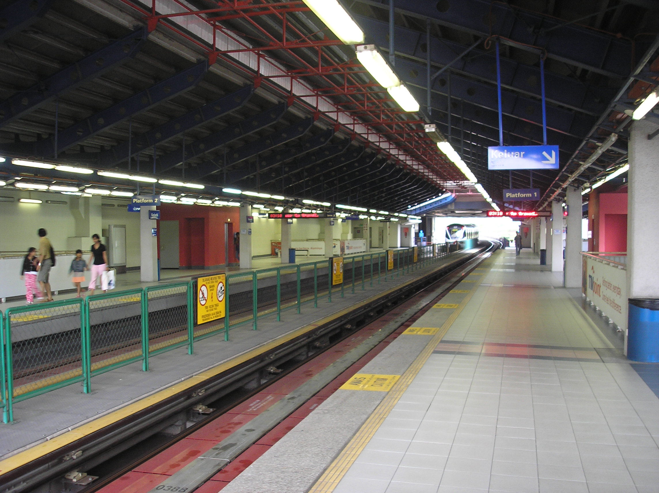 The Kerinchi LRT station (Kelana Jaya Line), Kuala Lumpur, Malaysia.